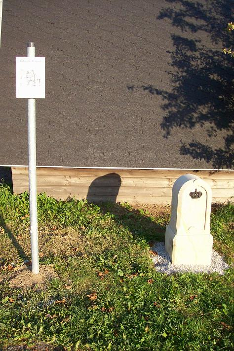 Königlich-sächsischer Halbmeilenstein (Nachbildung) bei Reichenau